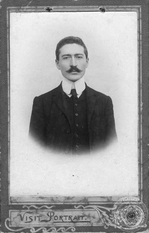 Йон Драгумис